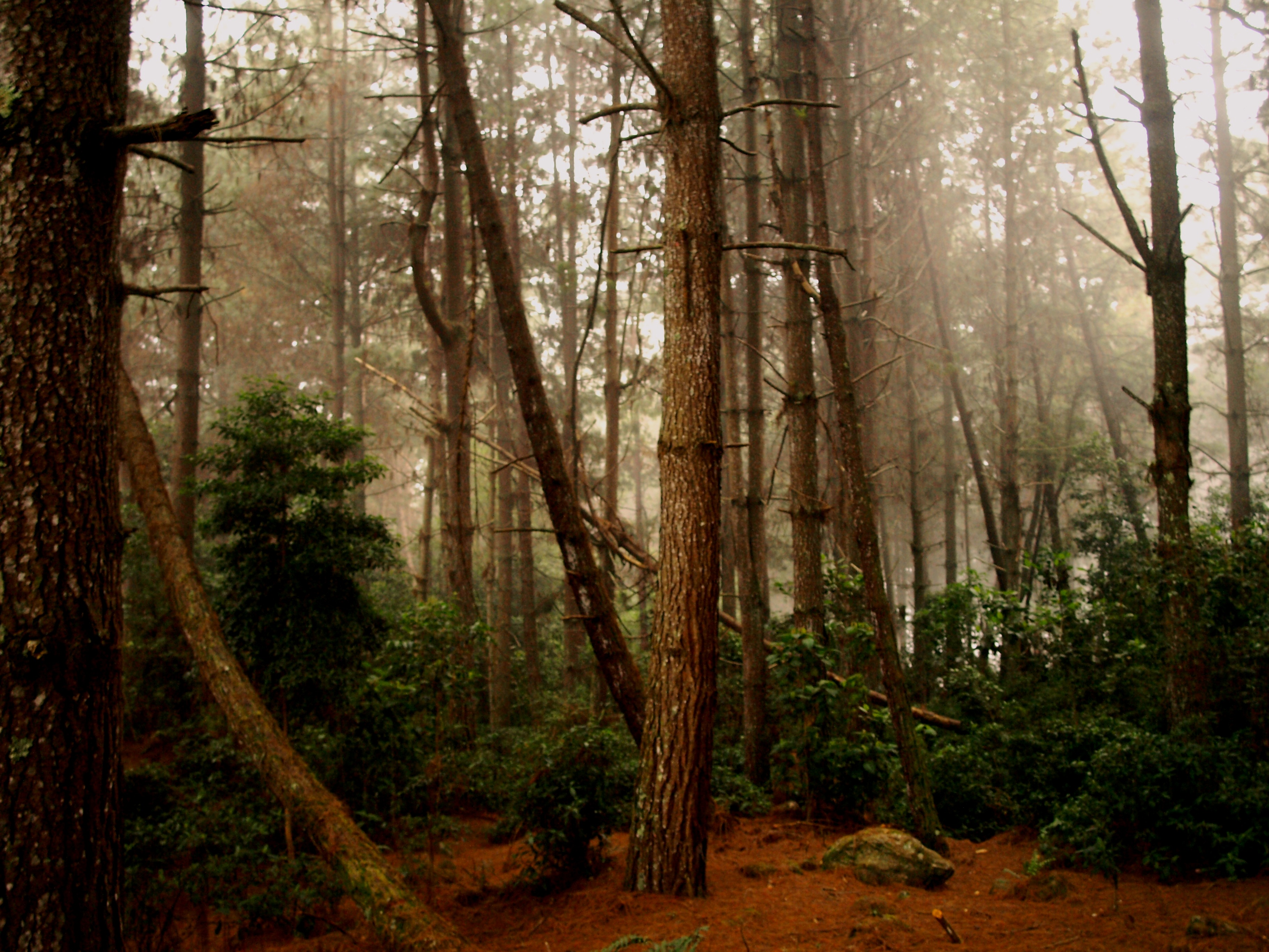 Neblina, vegetación y uno que otro ser escondido ante nuestra presencia.